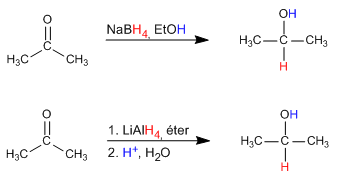 Aldehidoen erredukzioa